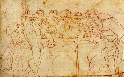 Correggio, studio per parapetto, museo di correggio (italia)